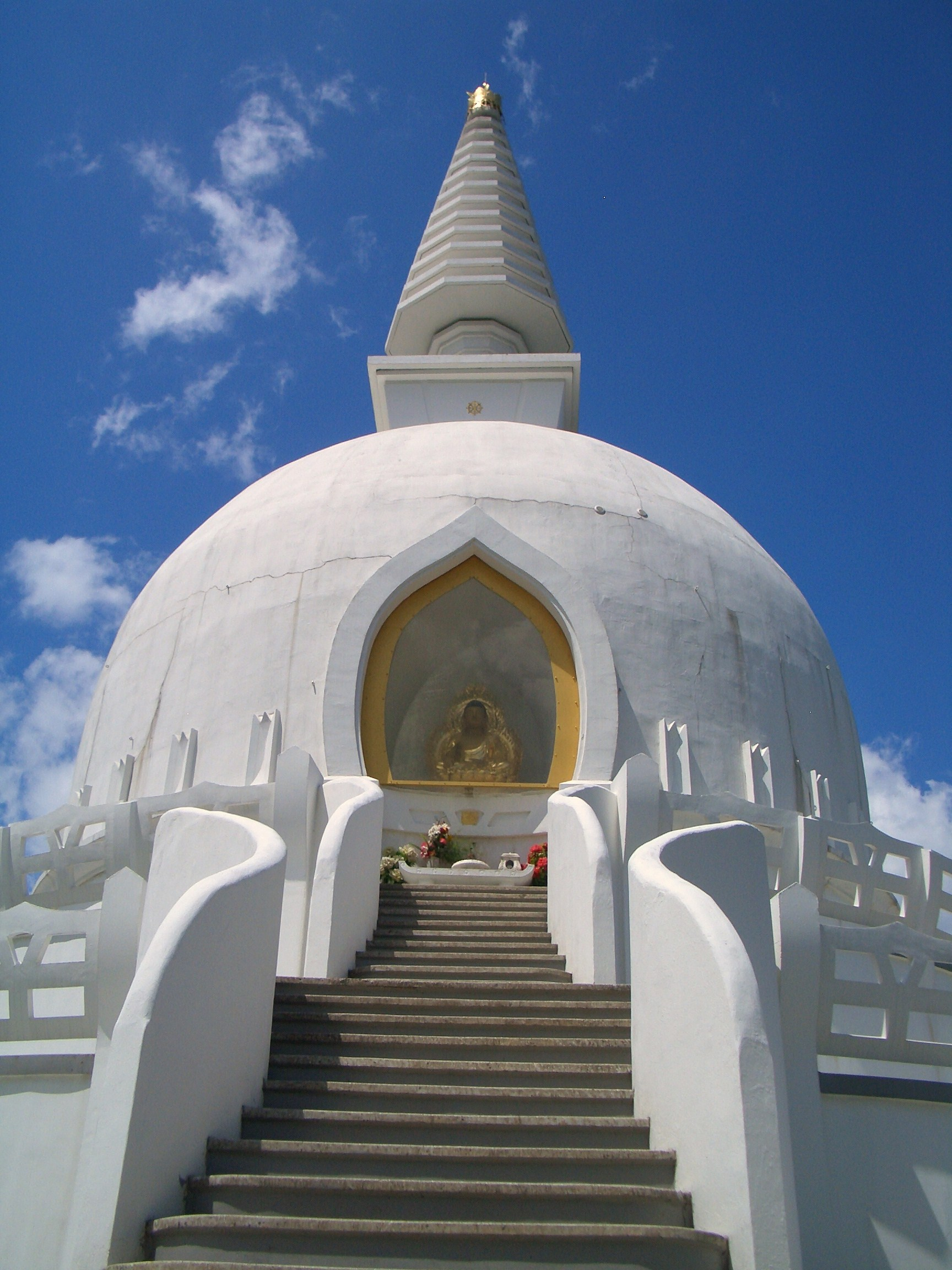 A zalaszántói sztupa (3)